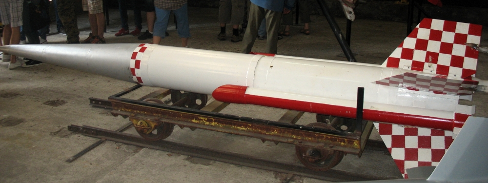 Rekonstrukcja rakiety Meteor 2 - zdjęcie wykonane w muzeum po dawnym poligonie pod Łebą (Rąbka)